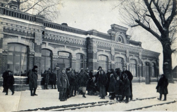 Залізничний вокзал с.Дмитрівка, станція Рубанка, 1943р.